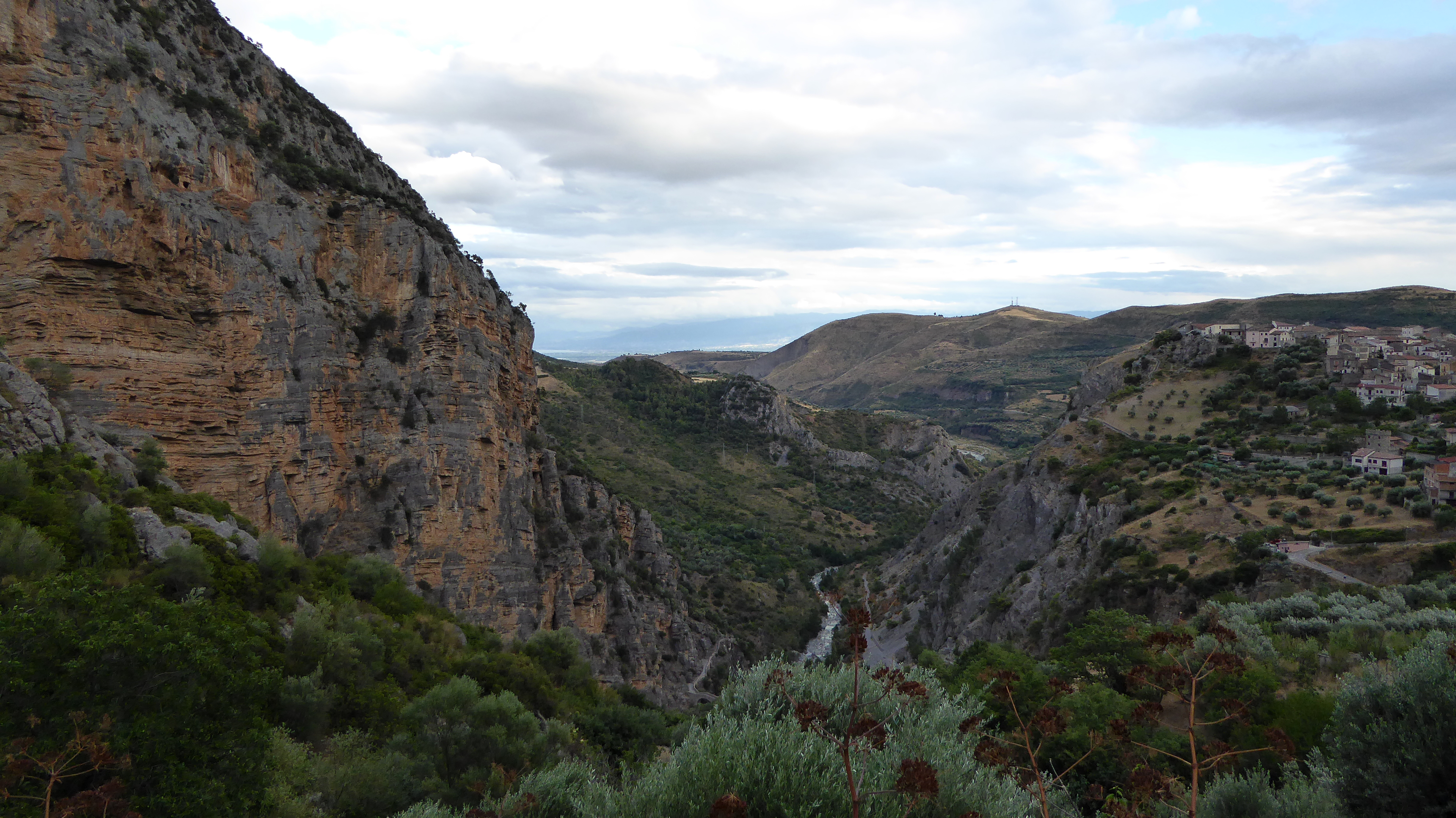 Schlucht von Reganello